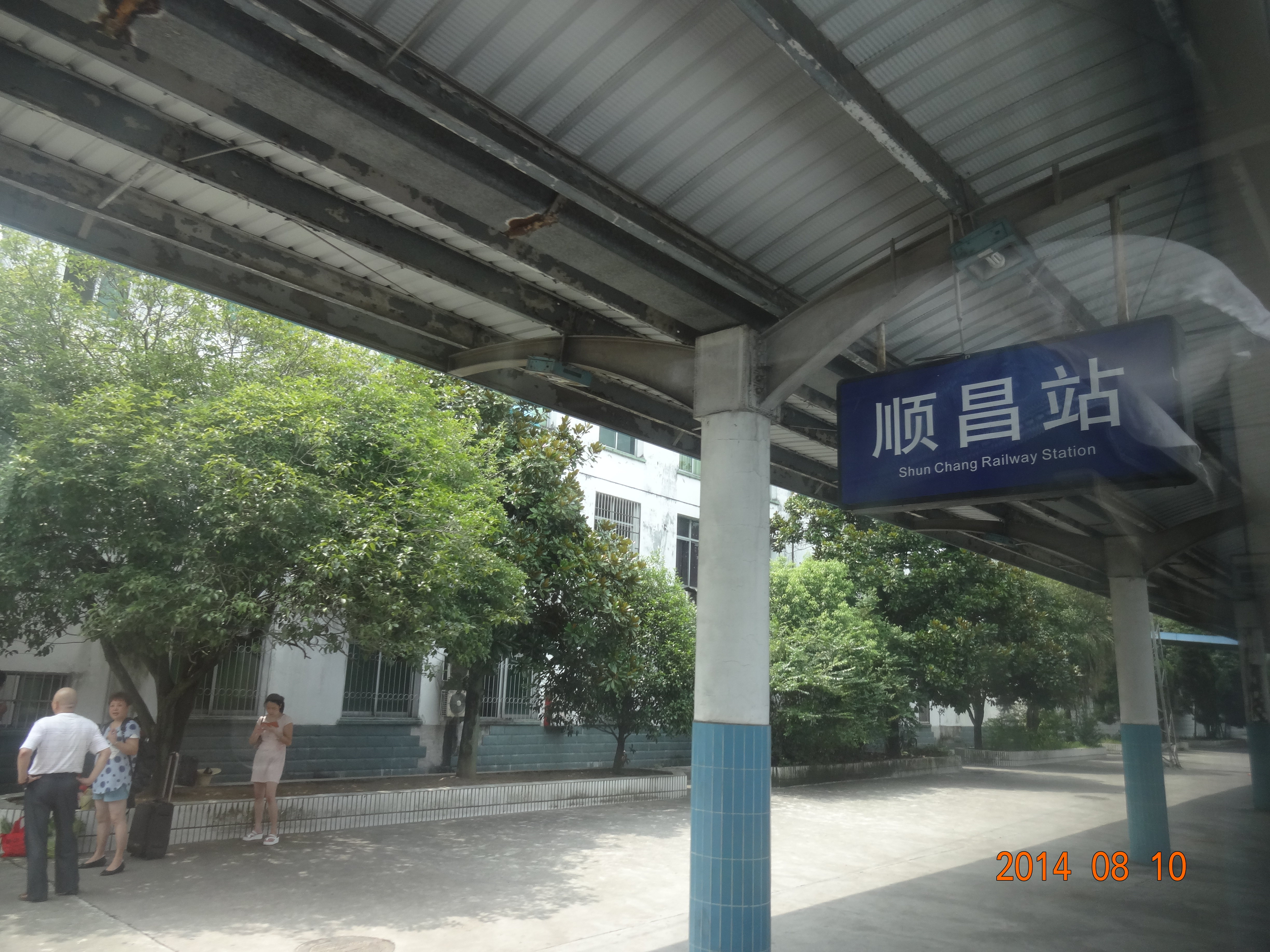 顺昌站